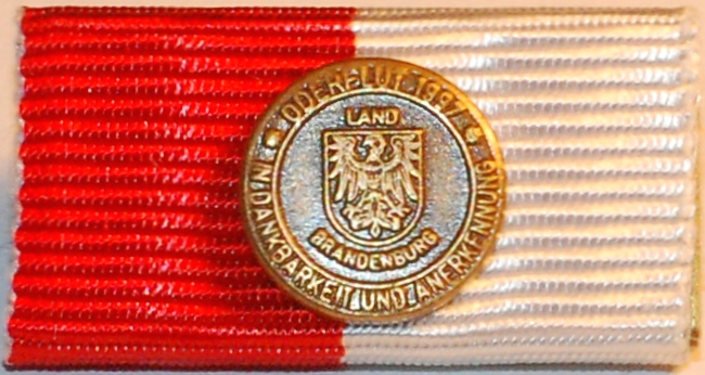 Oderflut-Medalie-Bandschnalle